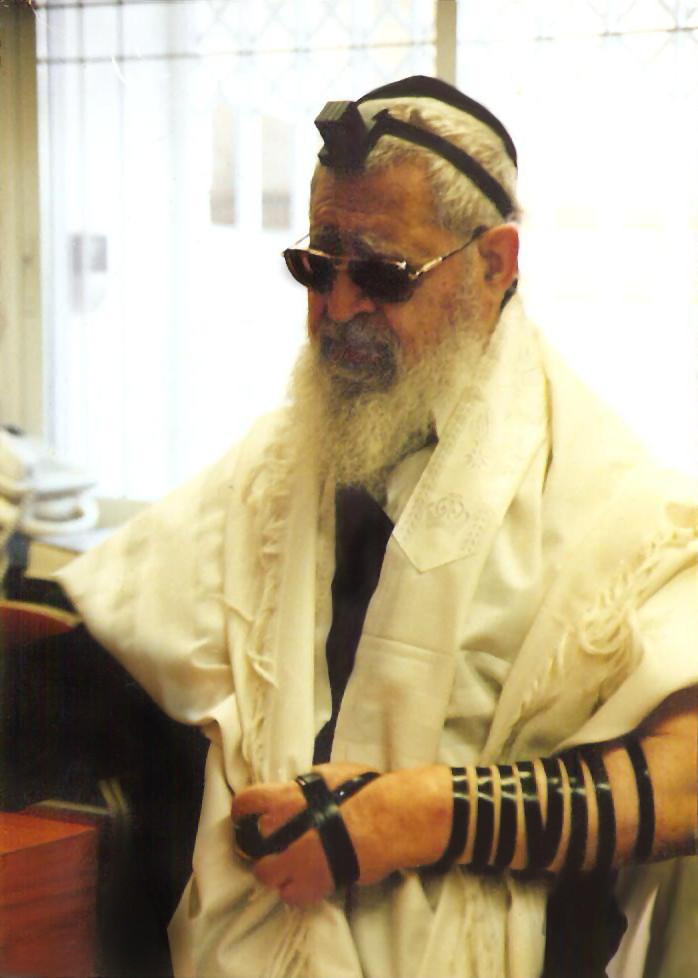 Rabbi Ovadia Yosef